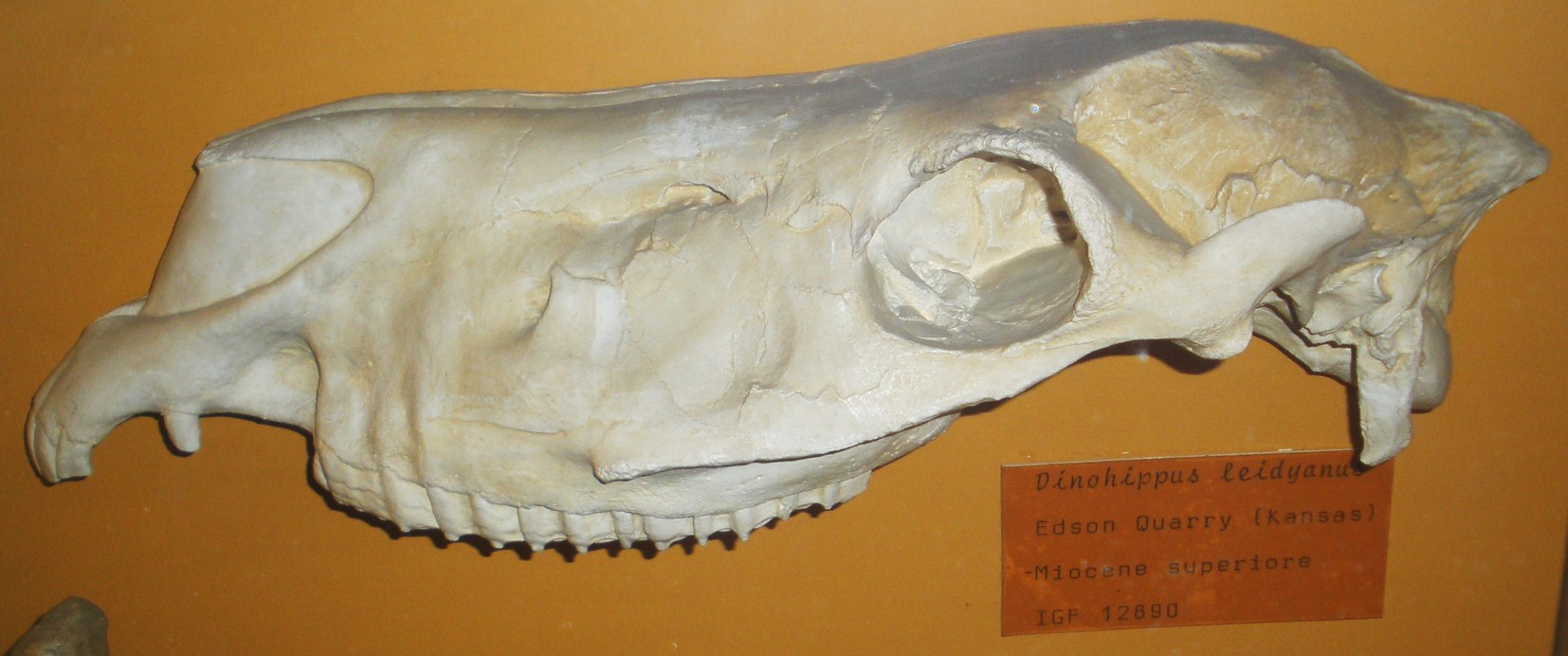 Fossil of Dinohippus, an extinct mammal - Took the picture at Museo di Paleontologia di Firenze